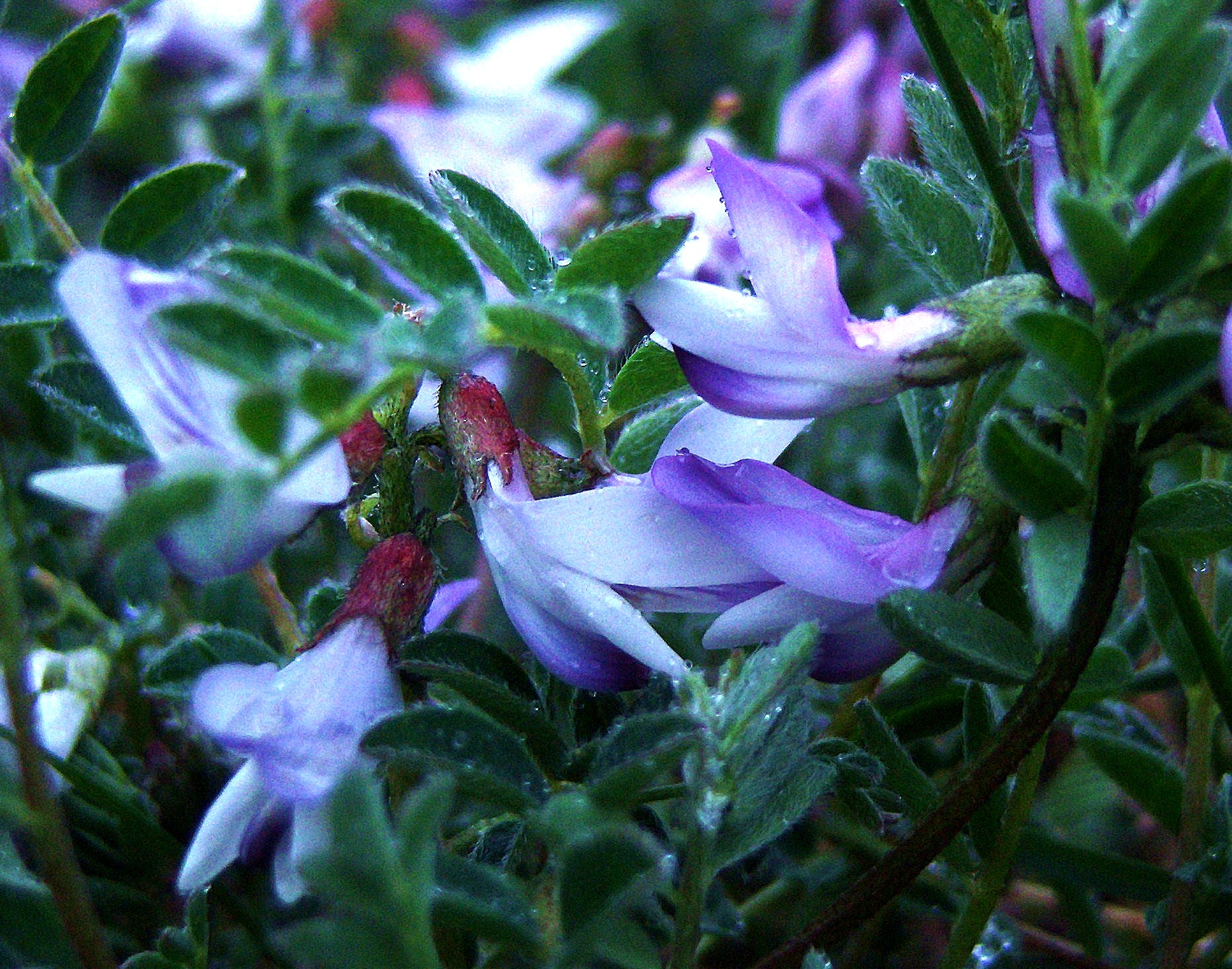 Unidentified Faboideae, Nunavut, Canada